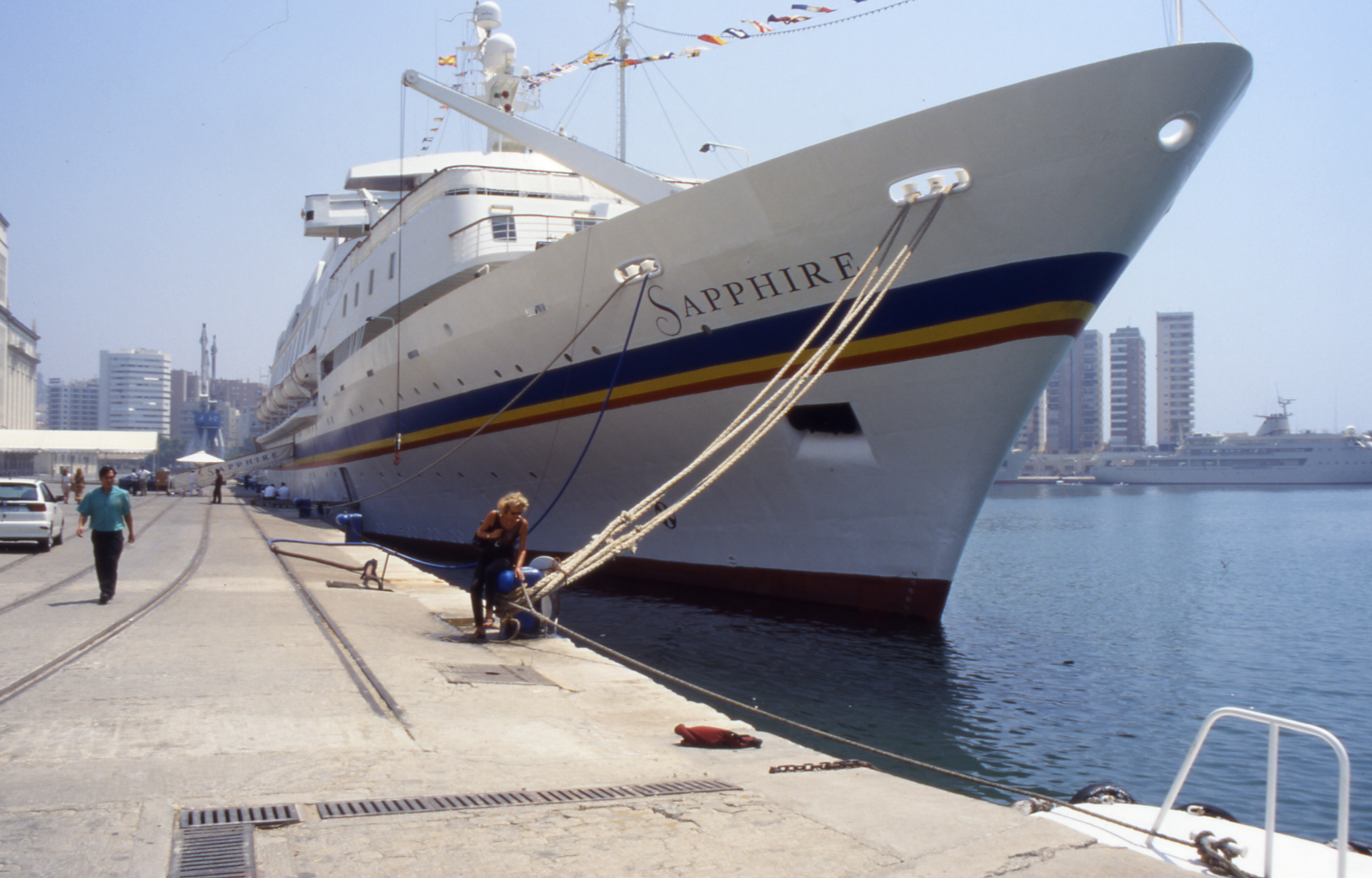 Malaga Hafen